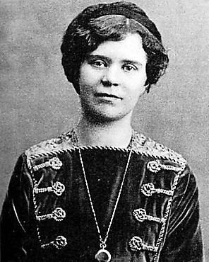 Алма Пихл (1888-1976) ювелир и дизайнер фирмы Фаберже